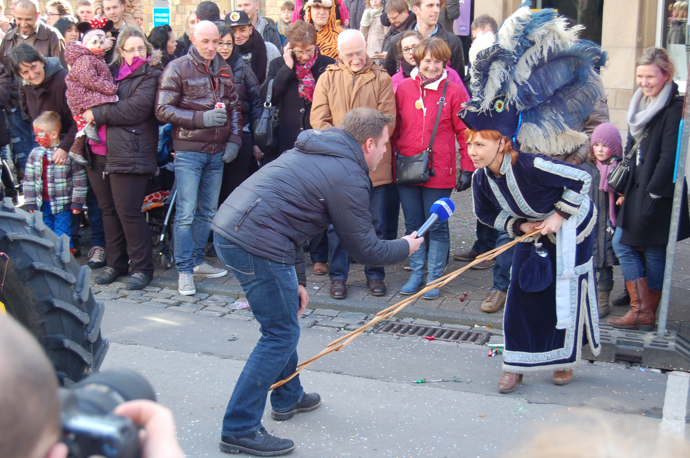 Carnaval Malmedy